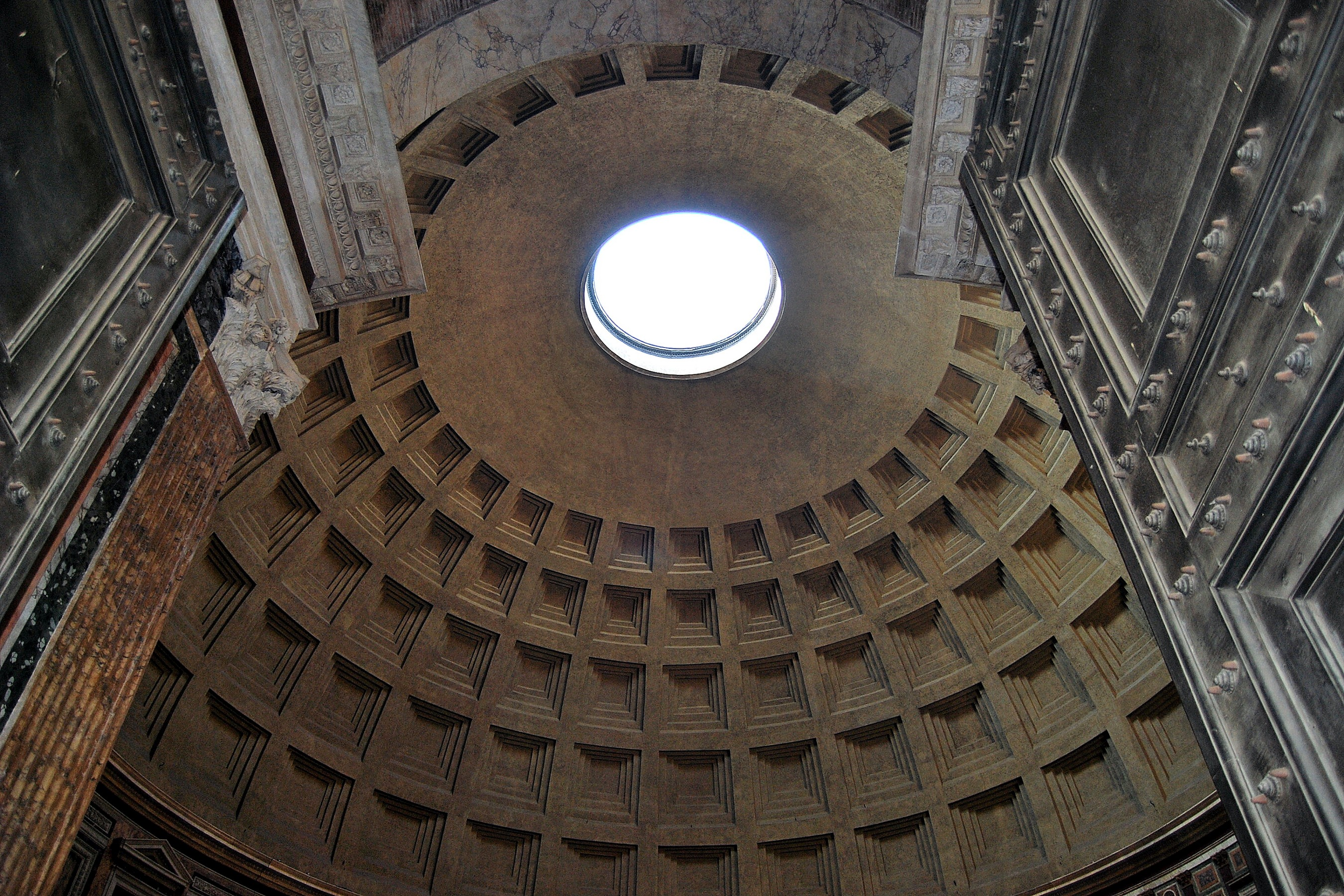 El Panteón de los Dioses, en Roma